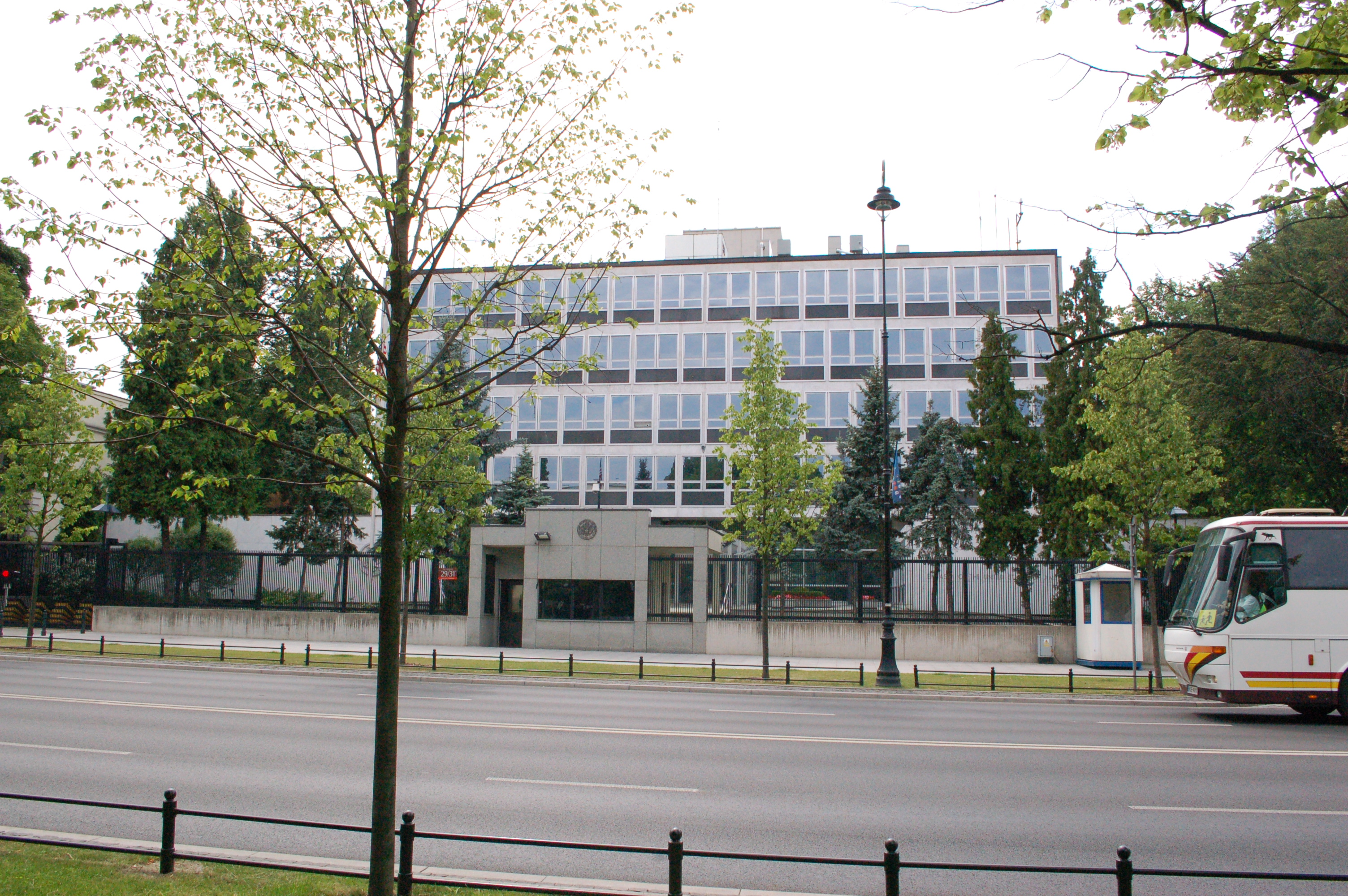 Warschau